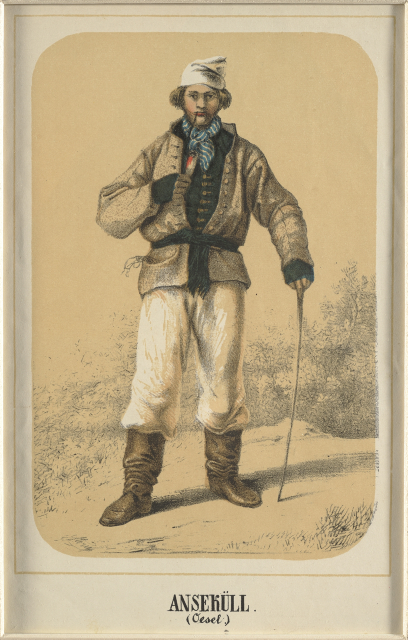 MuuseumikoguGraafika AutorStern, Friedrich SiegmundOlemusgraafikaDateeringDateering: 1856 - 1871OriginaaloriginaalKunstieseLisanumbridomaniku number: ARK 6823-2SäilivusrahuldavEraldatavad osadTehnika värviline litograafia Materjal paber Mõõdud graafikaplaadi kõrgus: 17.2 cm; graafikaplaadi laius: 15.6 cm; lehe kõrgus: 21.6 cm; lehe laius: 15.6 cm füüsiline kirjeldus Seisev noormees laiades valgetes pükstes, parema käega hoiab suus kõrt, vasakuga toetub kepile tekst objektil ANSEKÜLL. (Oesel.) kommentaar Vt Gustav Ränk 2000, lk 270